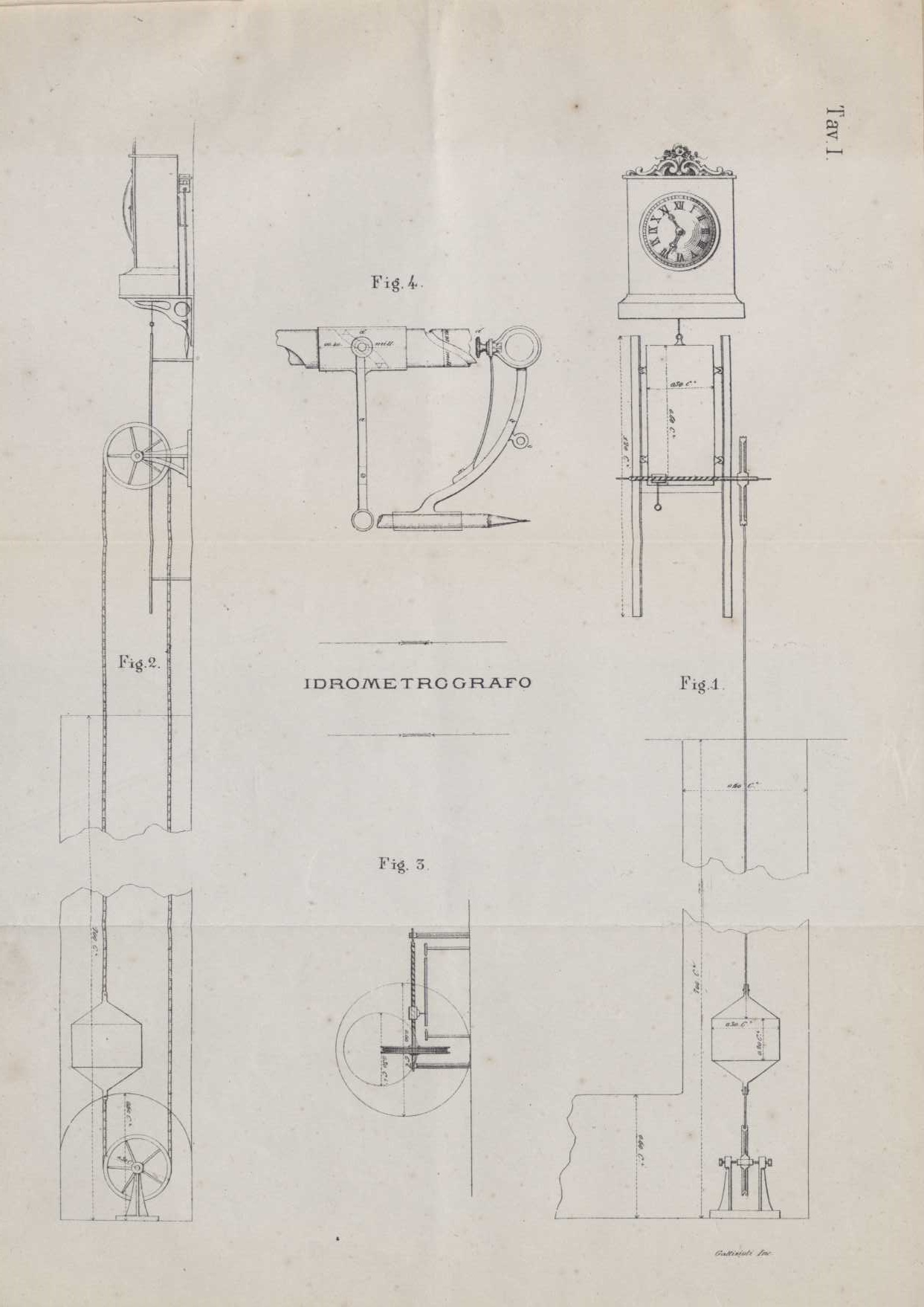 Idrometrografo tratto da Intorno a due istrumenti automatici che descrivono in modo continuo le curve delle pioggie e delle variazioni nel pelo dell'acqua dei fiumi